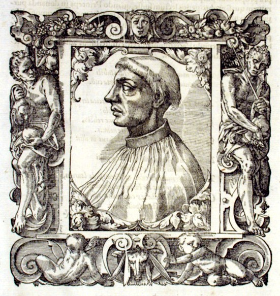 Marcus Musurus (* um 1470 in Candia auf Kreta; † 1517 in Rom), griechisch-italienischer Gelehrter und Humanist. Aus dem Buch Elogia Virorum literis illustrium von Pietro Perna und Heinrich Petri